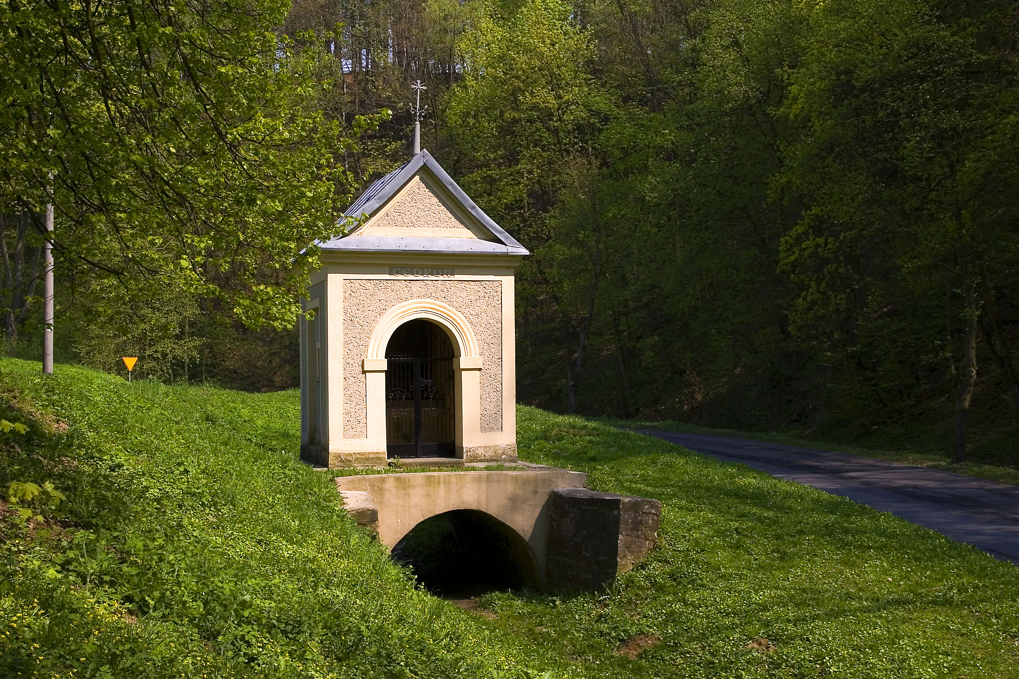 Góra św. Anny, kaplica Cedron.Gmina Leśnica, powiat strzelecki